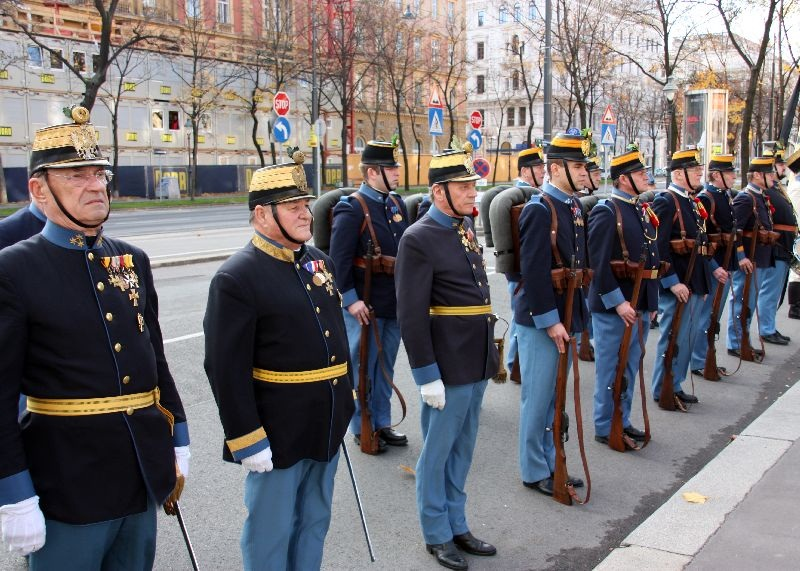 Deutschmeister Schützenkorps in Einteilung angetreten